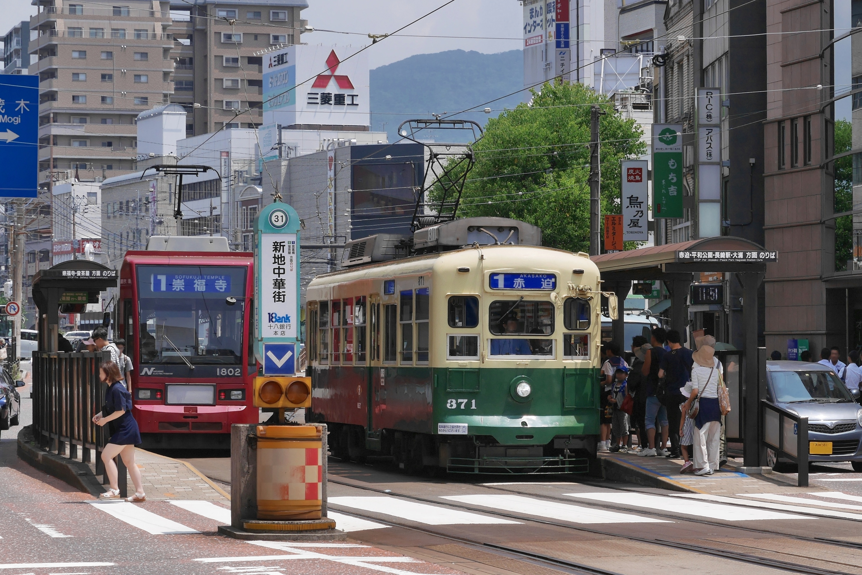 長崎電気軌道の新地中華街停留所（長崎県長崎市）。2018年8月に「築町」より改称された。